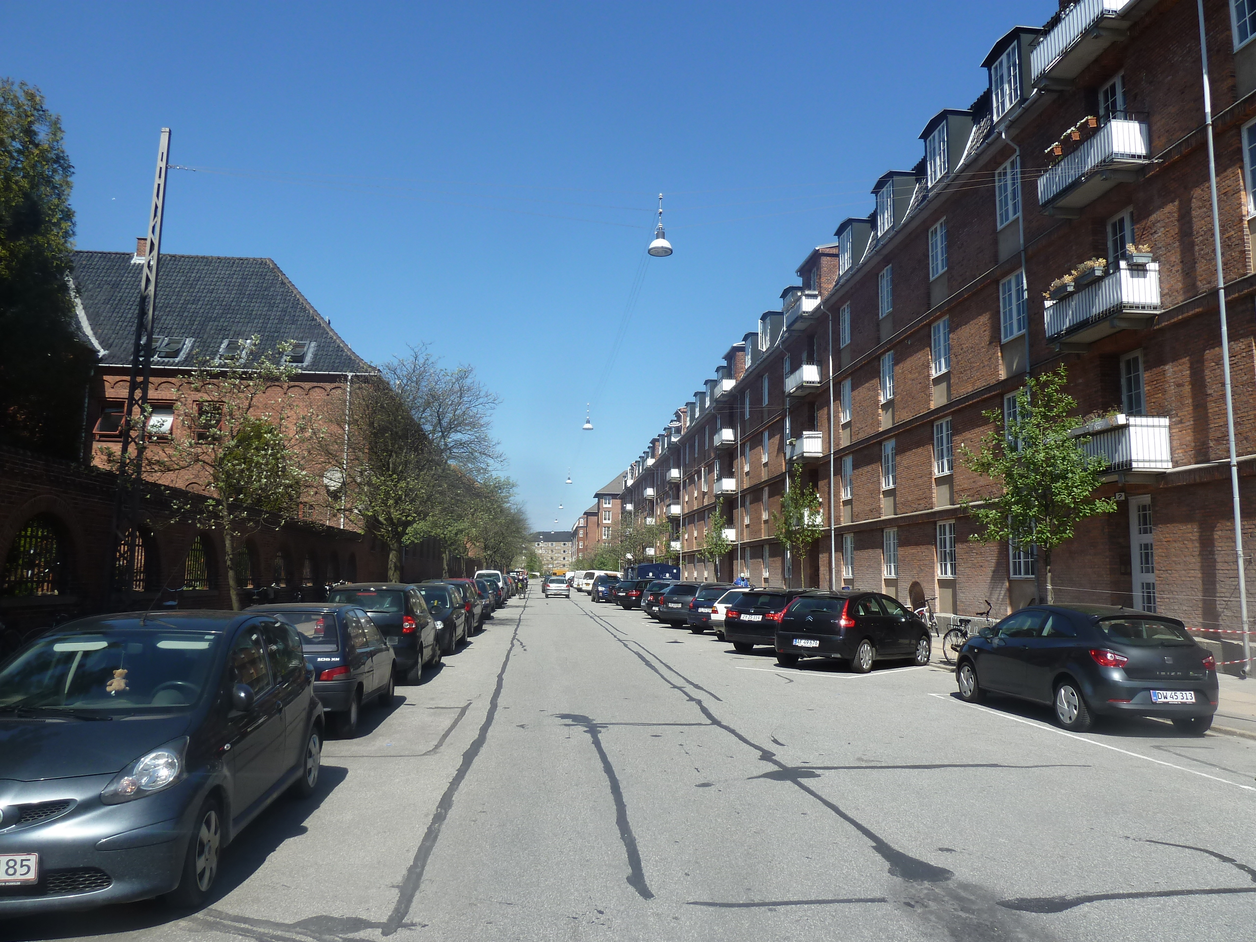 The street Sankt Kjelds Gade in Østerbro in Copenhagen.